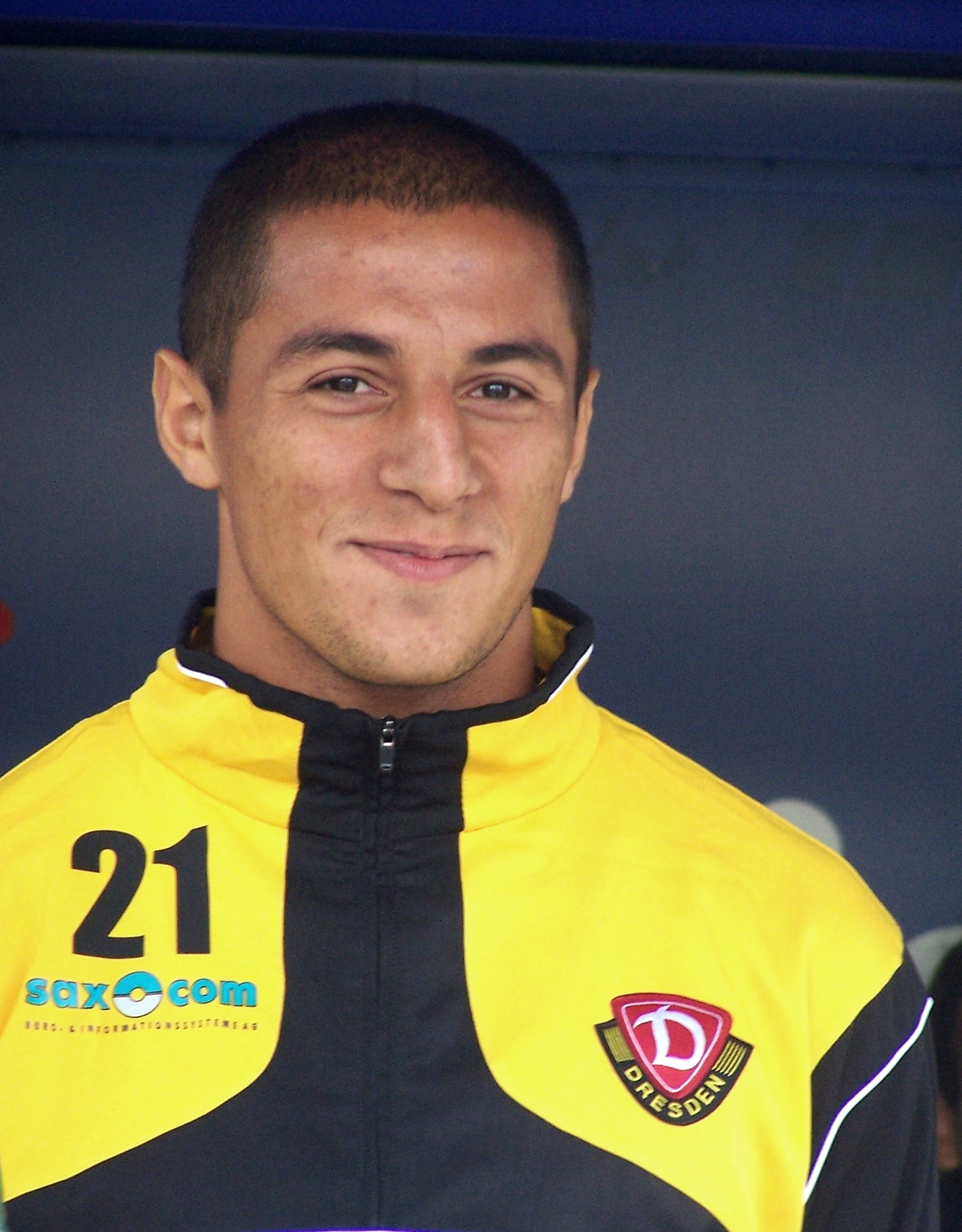 Halil Savran bei der Teampräsentation von Dynamo Dresden zum Start der Drittliga-Saison 2008/09